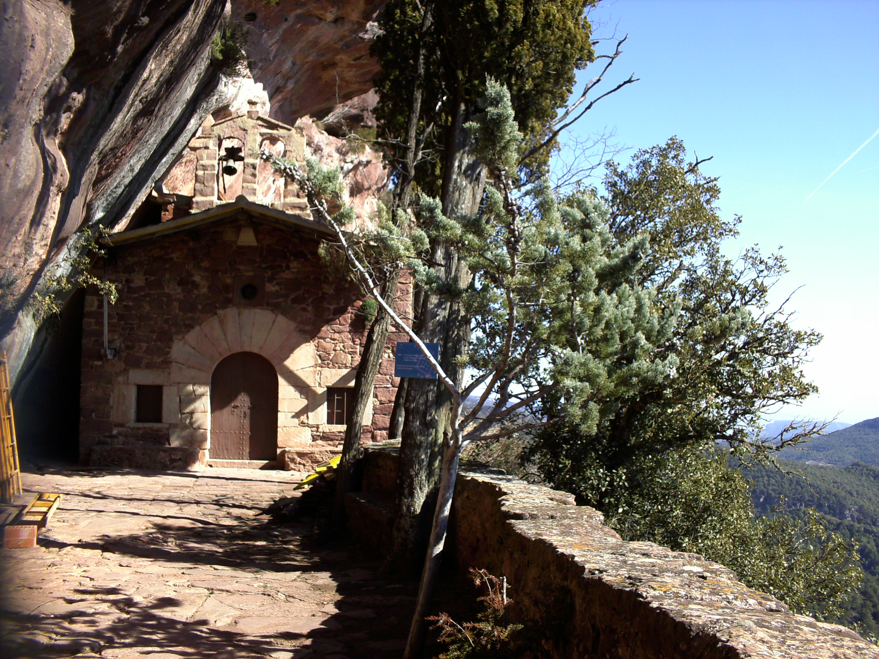 Ermita de l'Abellera